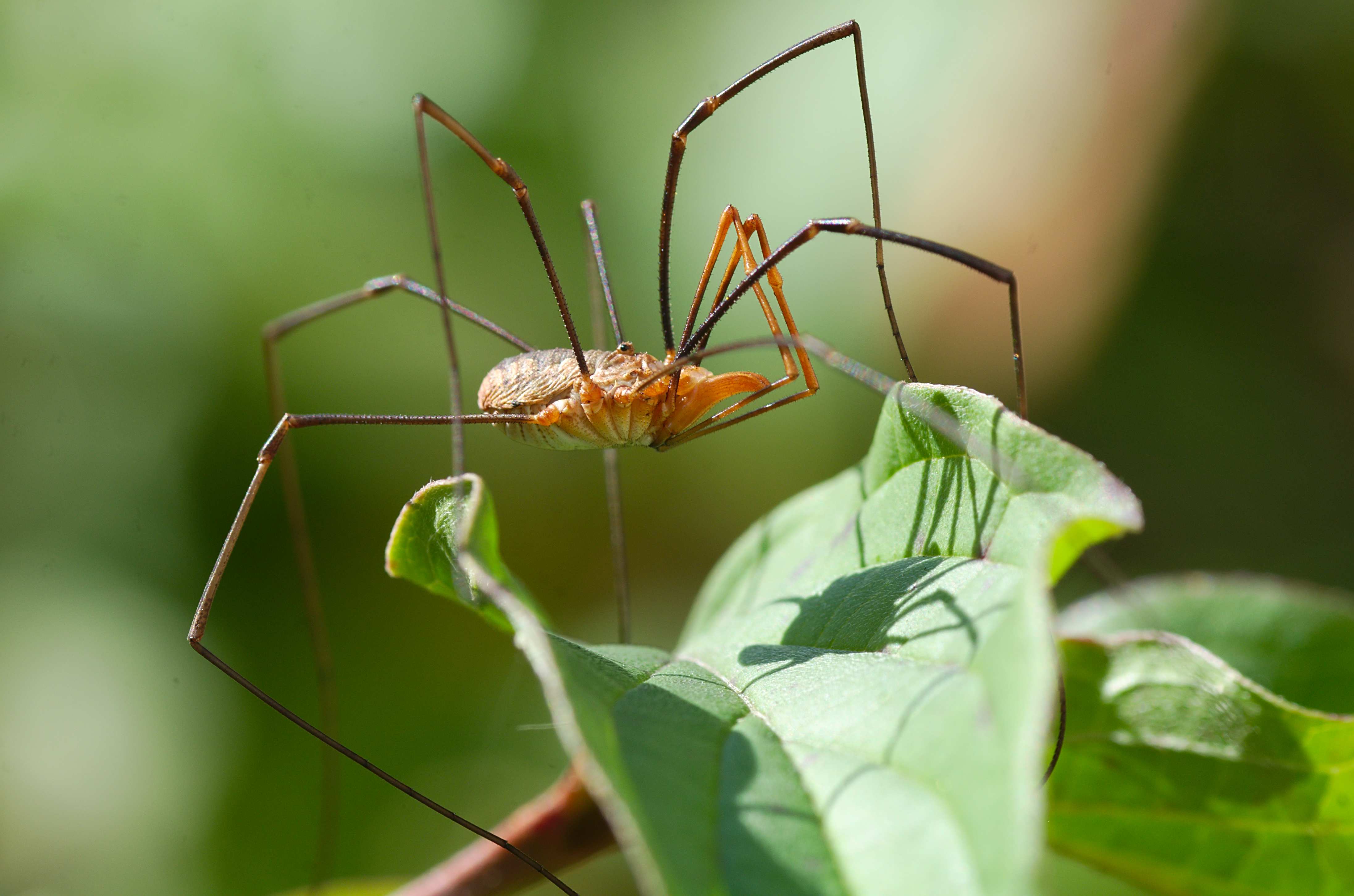 Macro-Aufnahme von einem Weberknecht (Opiliones)